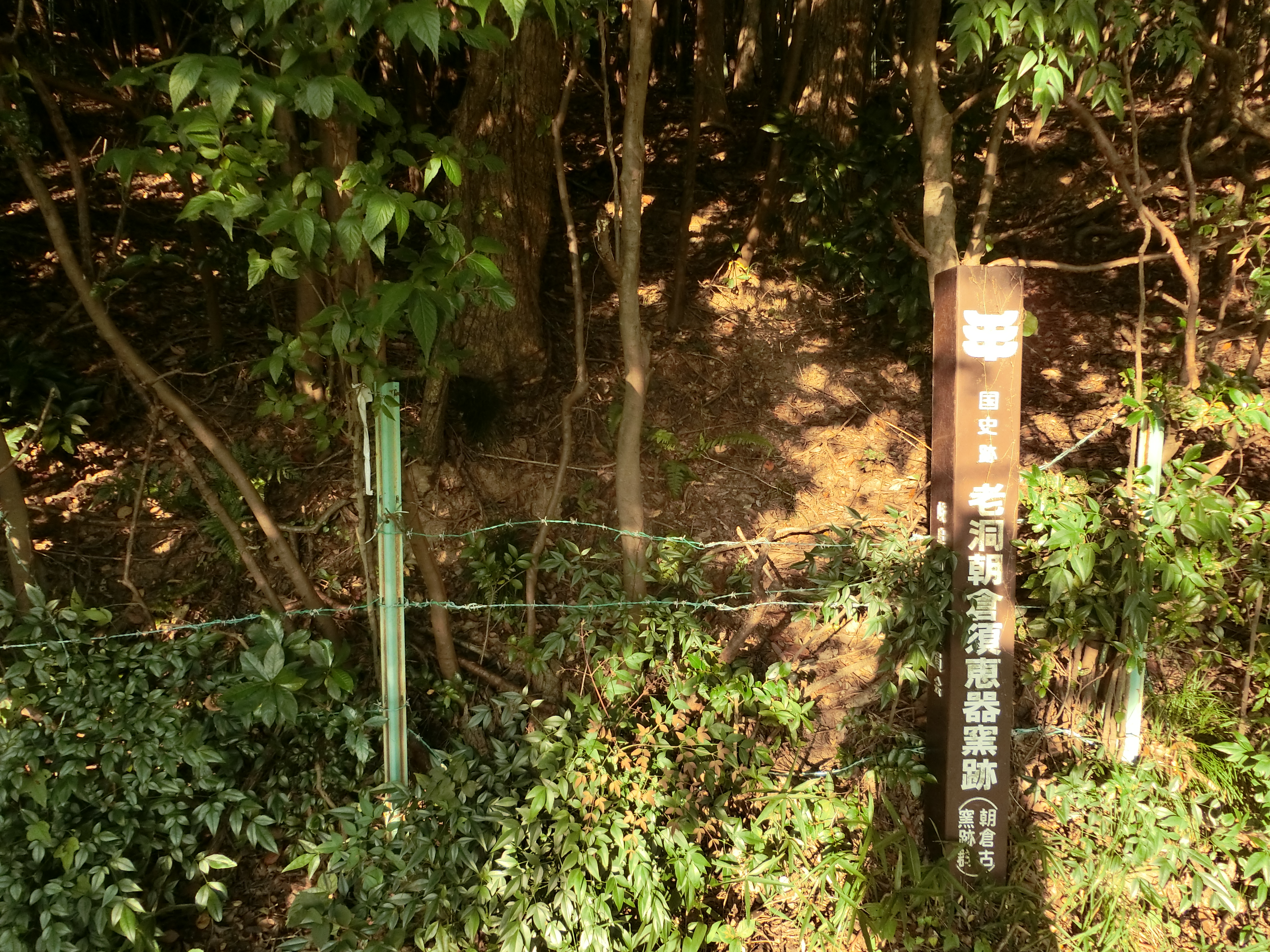 国指定史跡で美濃国分寺や平城京などに須恵器を供給した老洞・朝倉須恵器窯跡のうち、朝倉古窯跡。